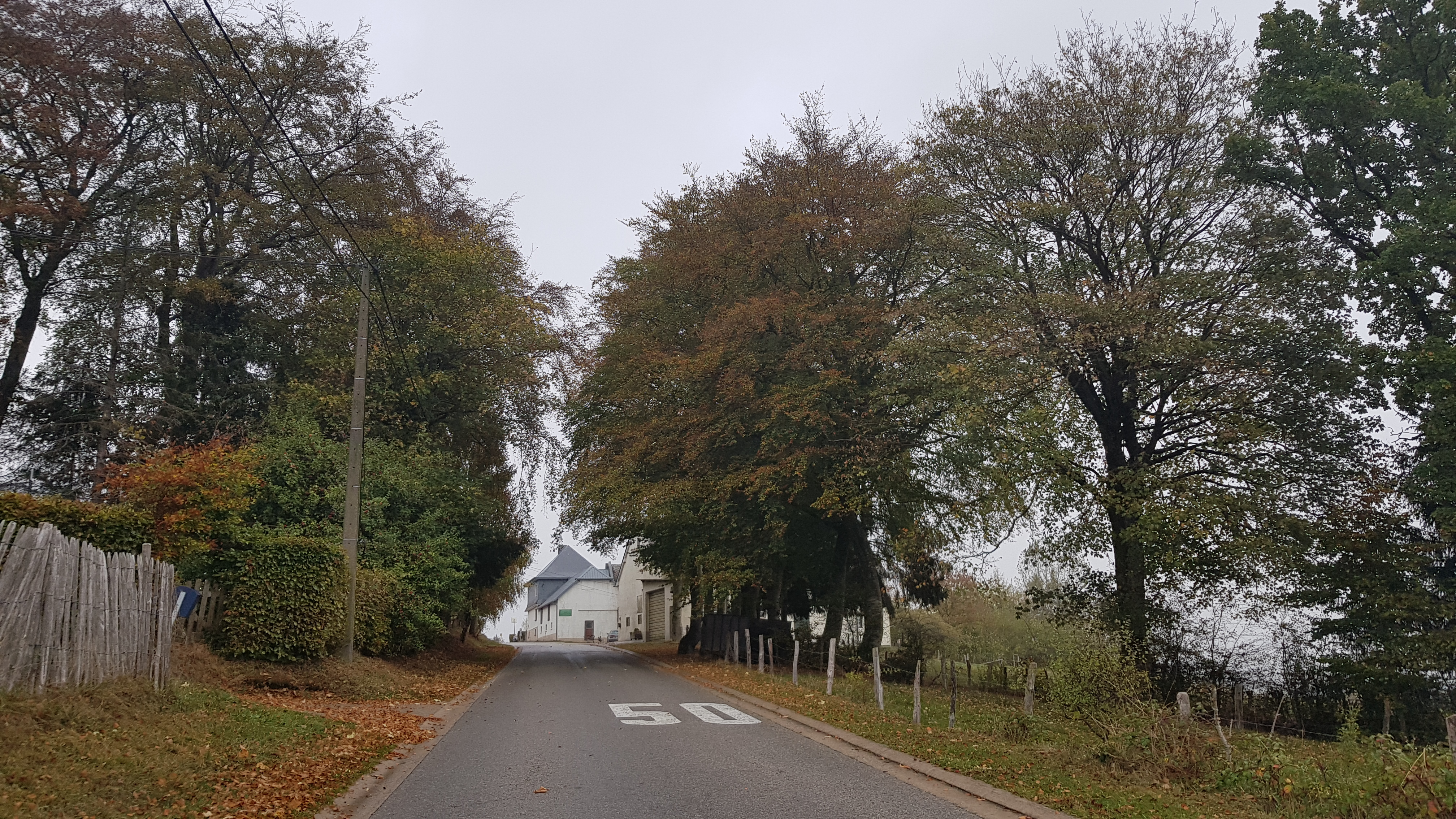 Merlscheid, Büllingen, Belgien